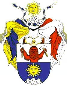 Znak Výsluní